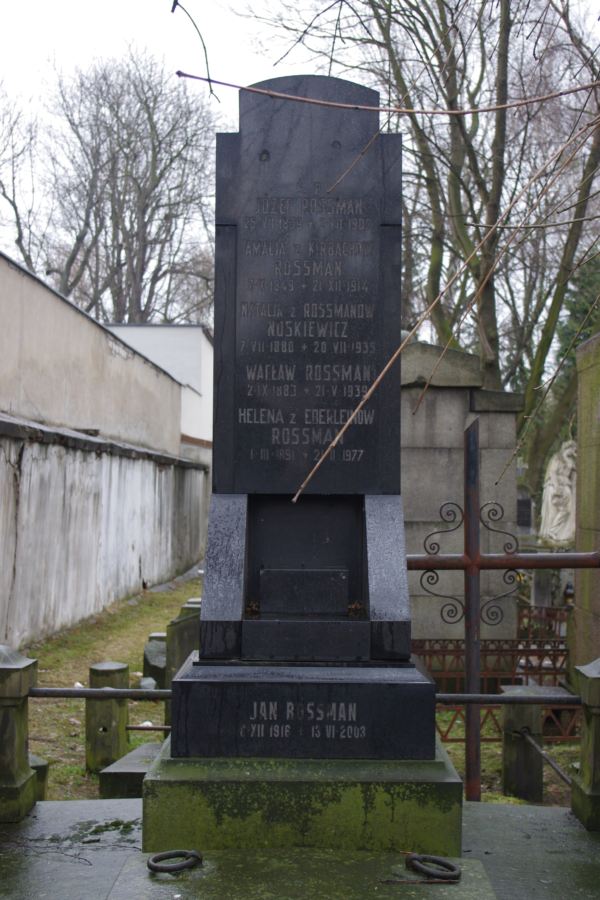 Grób harcmistrza Jana Rossmana (1916-2003) na Cmentarzu ewangelicko-reformowanym w Warszawie